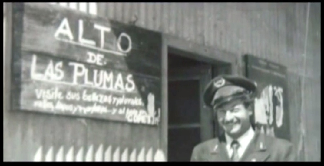 La estación Alto de Las Plumas con su guarda hacia 1940.